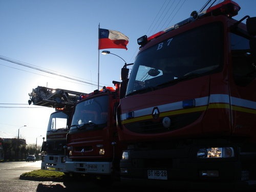 B-7,Bx-7 y M-7 temuco